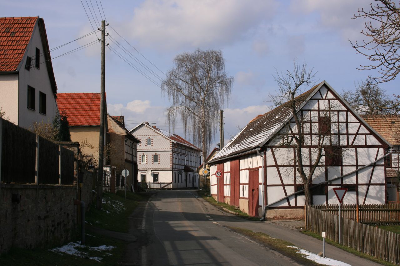 Zwackau